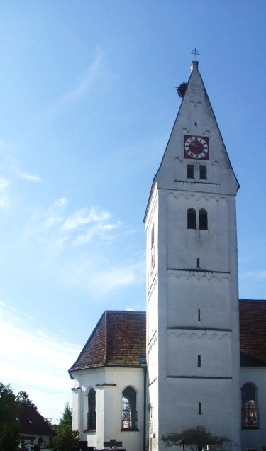 Kath. Pfarrkirche St. Gordian und Epimachus, Unterroth, Landkreis Neu-Ulm